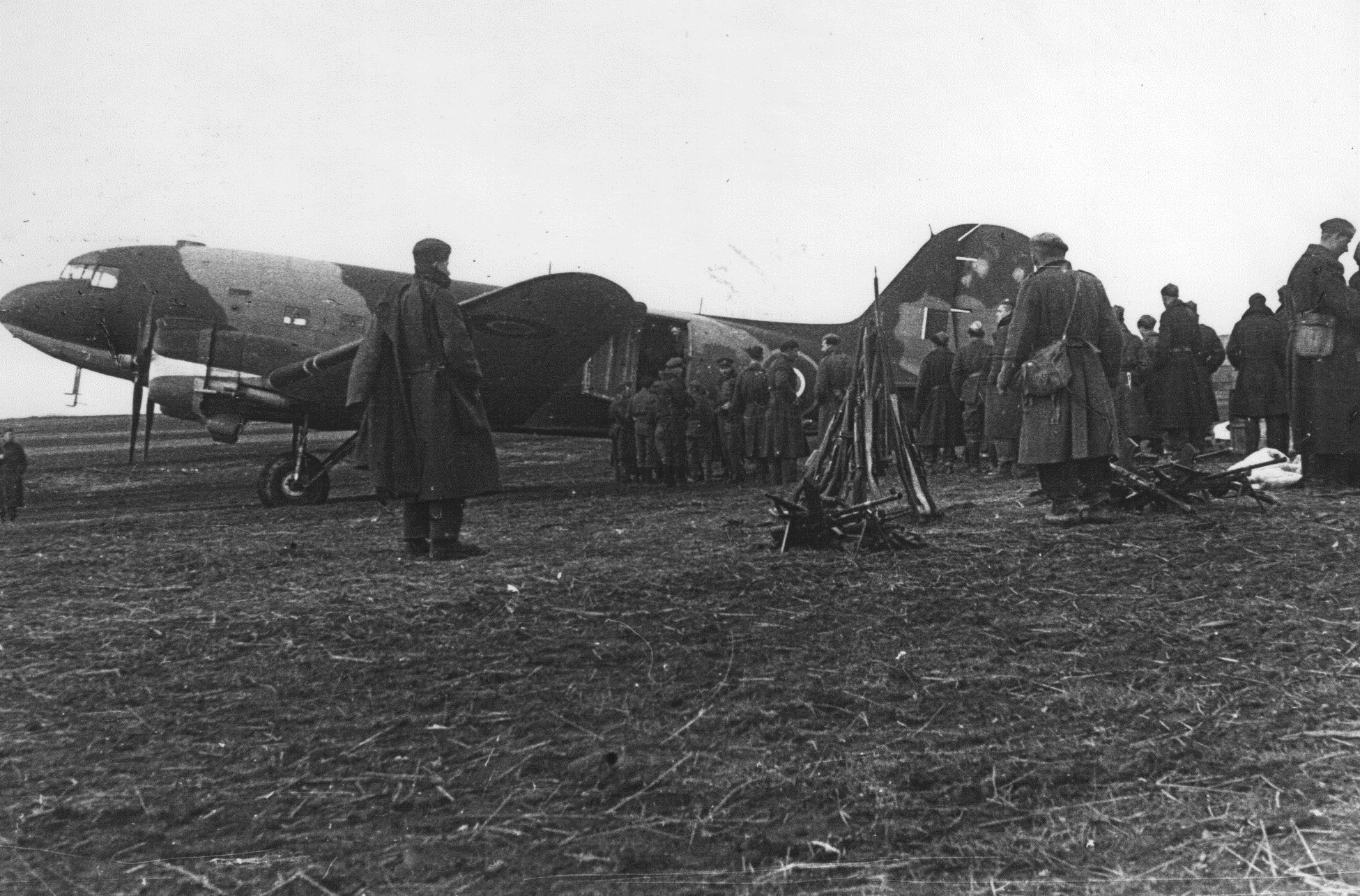 Zavezniško letalo med vkrcavanjem ranjencev na letališču Otok